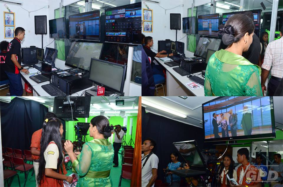 Start vom Bildungsfernsehen TVET in Osttimor